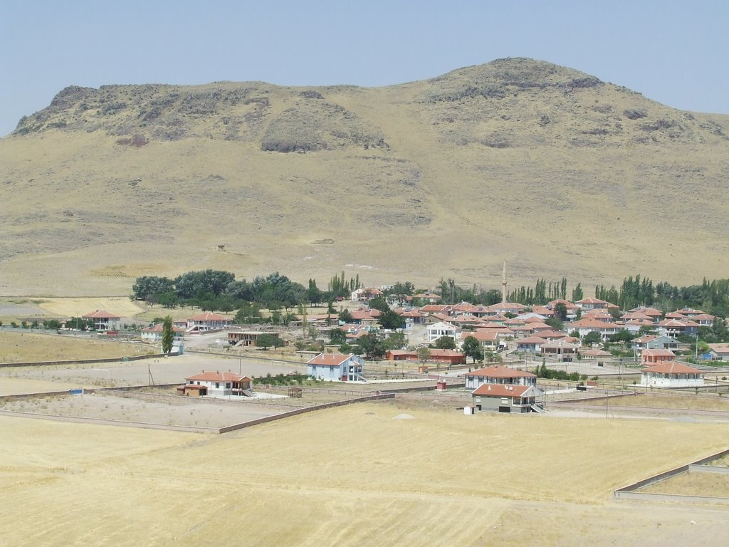 Arşıncı Manzarası